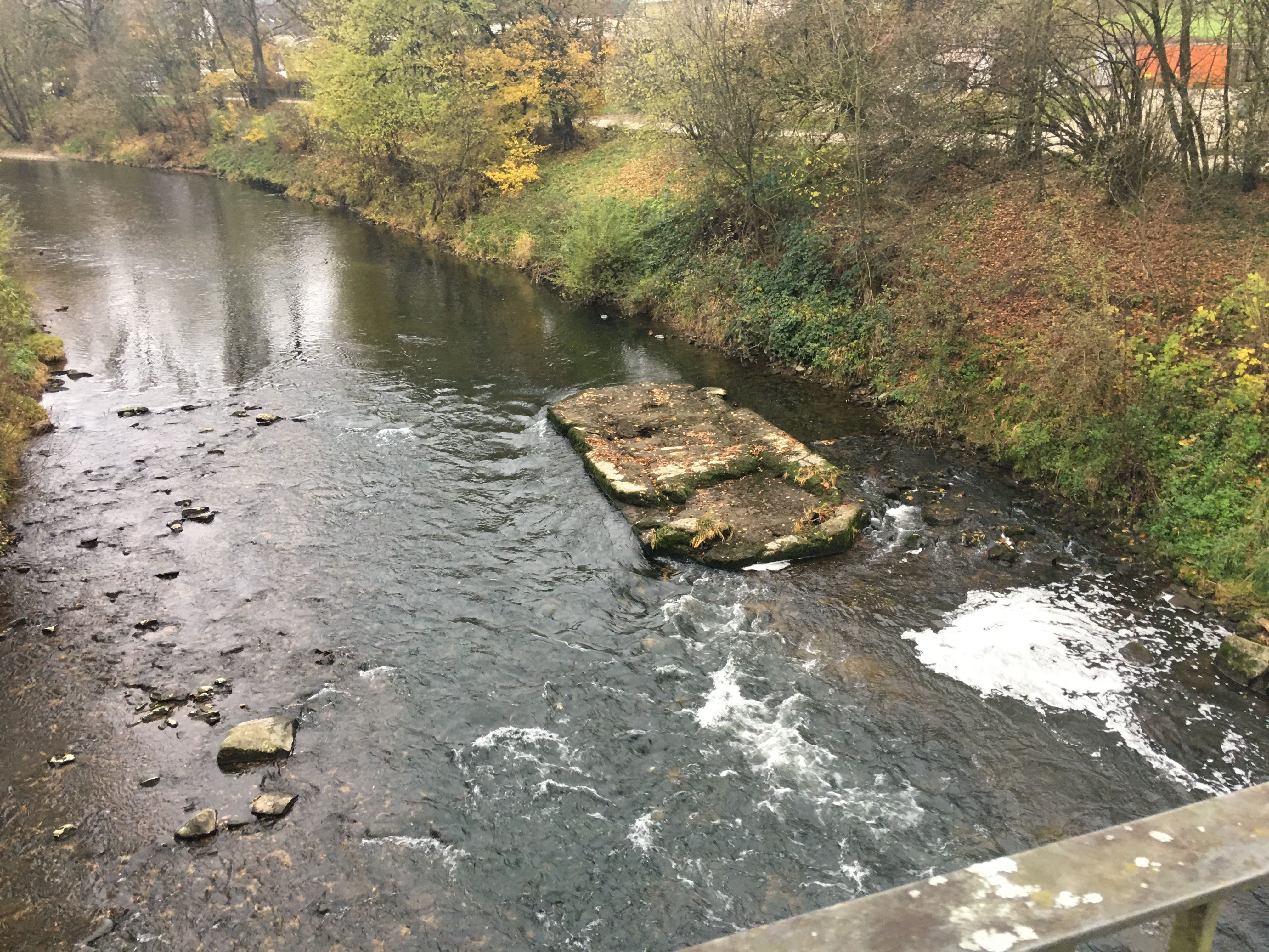 Von der Bahnstrecke Wernau-Abzweigstelle Schnaitwald haben sich nur wenige Spuren erhalten: hier das Fundament der Eisenbahnbrücke über die Fils.